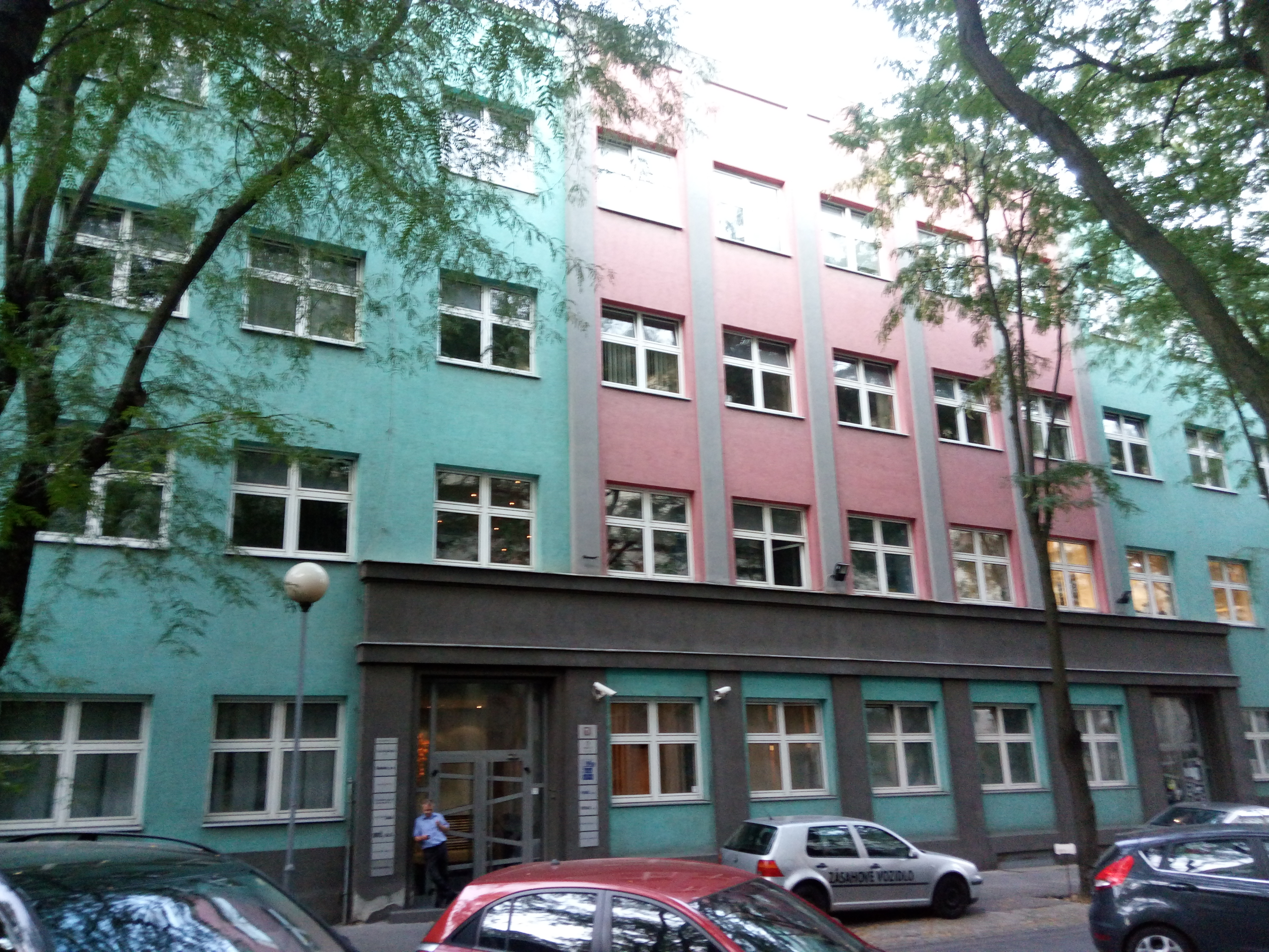 Sasinkova 5, Staré Mesto, Bratislava